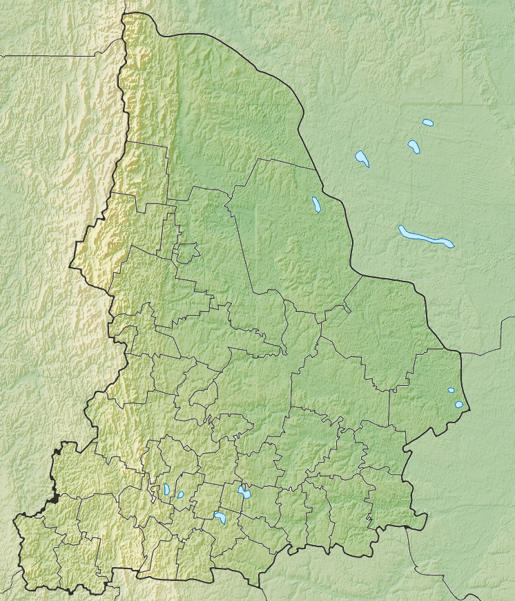 Физическая карта Свердловской области, Россия.